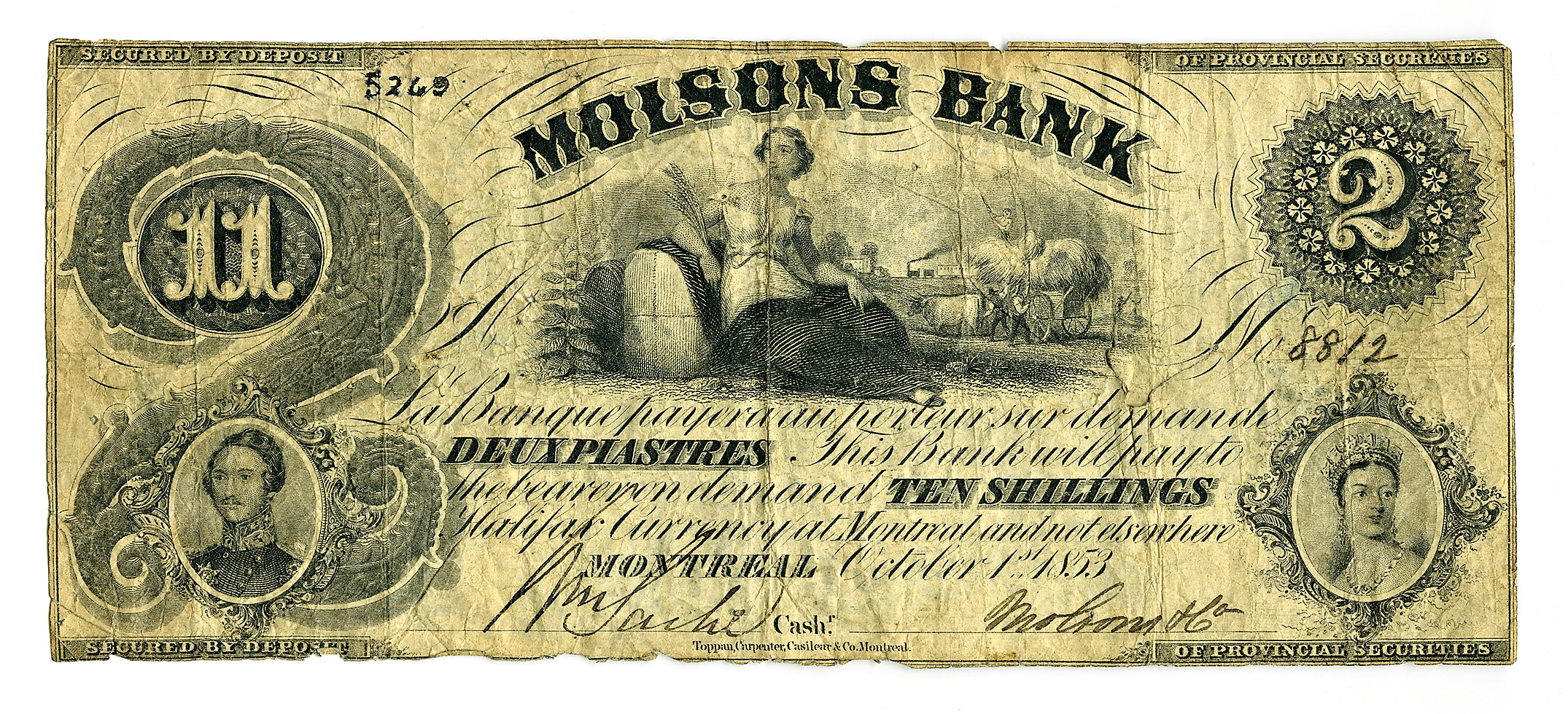 Billet de dix shillings ou de deux piastres de la Banque Molson